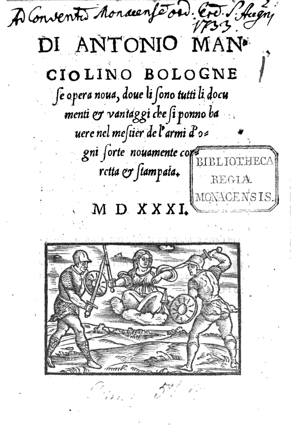 Титульный лист руководства по фехтованию Antonio Manciolino "Opera Nova", 1531 г.